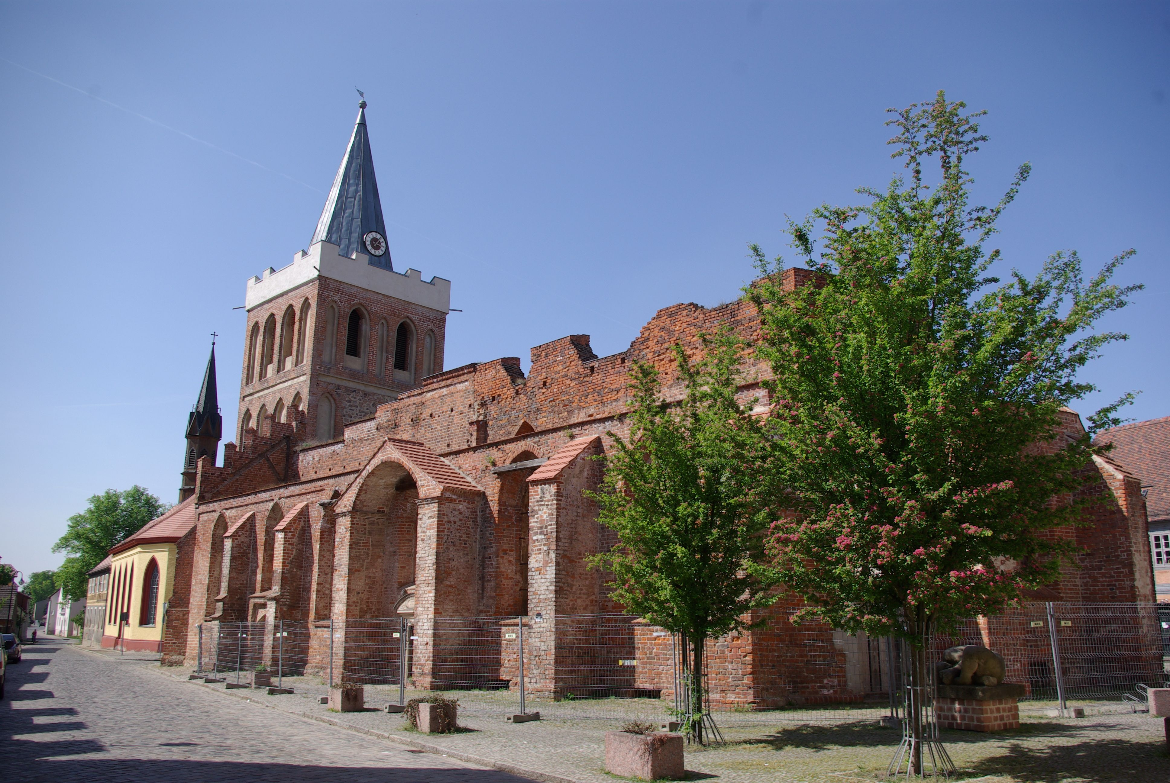 Lieberose in Brandenburg. Die Stadtkirche ist seit 1945 eine Ruine, sie steht unter Denkmalschutz. Links im Hintergrund ist die Landkirche zu sehen.